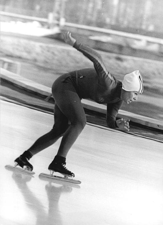 Heike Lange ADN-ZB Thieme 22.12.74 Karl-Marx-Stadt: Mit kraftvollen Schritten dem Ziel entgegen- Bei den DDR-Mehrkampfmeisterschaften im Eisschnellauf führte nach dem ersten Tag die Berlinerin Heike Lange (SC Dynamo) den Wettbewerb der Frauen an. Unser Foto zeigt sie auf der 1000m-Distanz am 22.12.74. Abgebildete Personen: Lange, Heike: Eisschnelläuferin, DDR